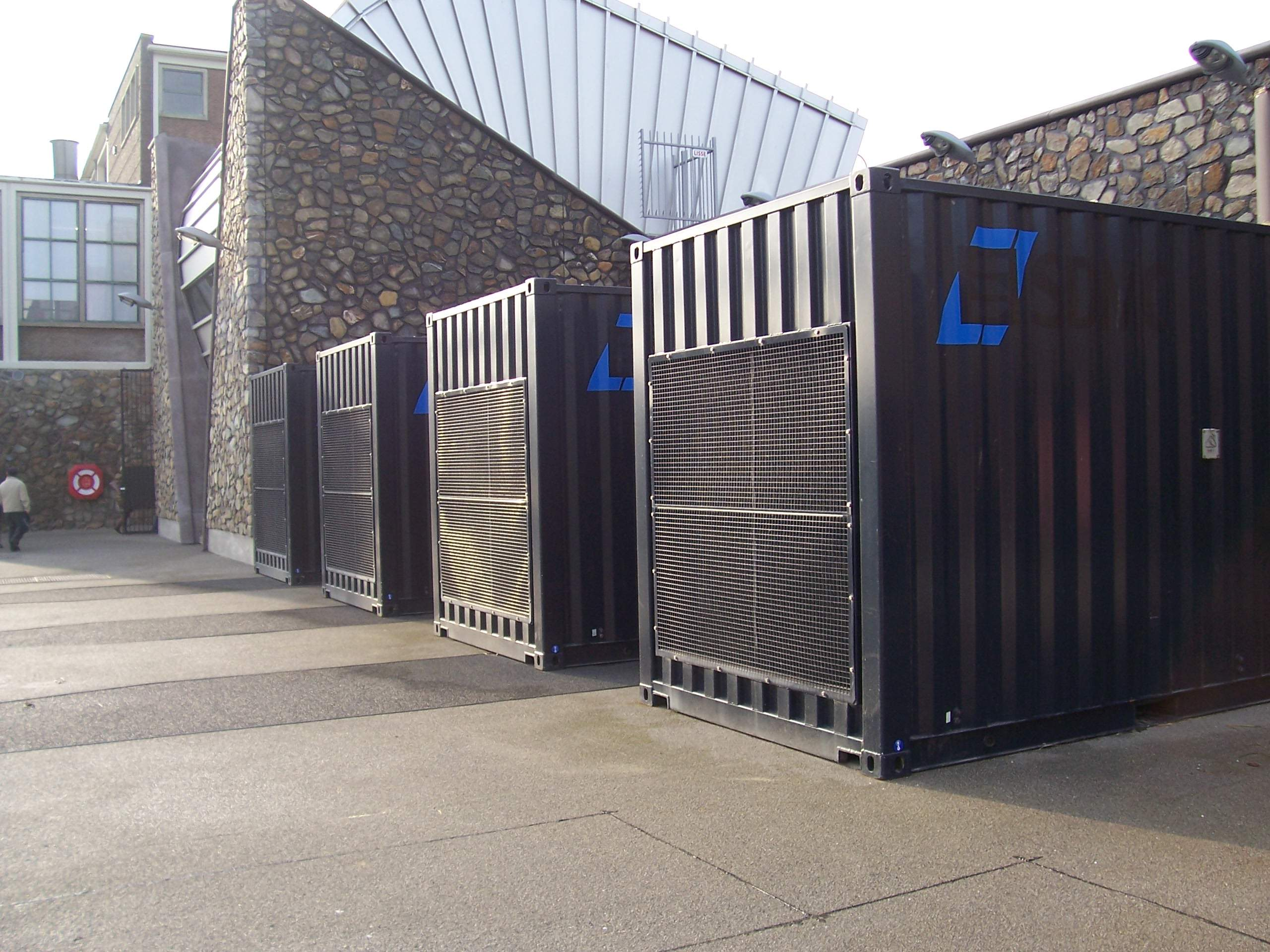 Achterzijde (deels vernieuwde) boezemgemaal Katwijk 2011